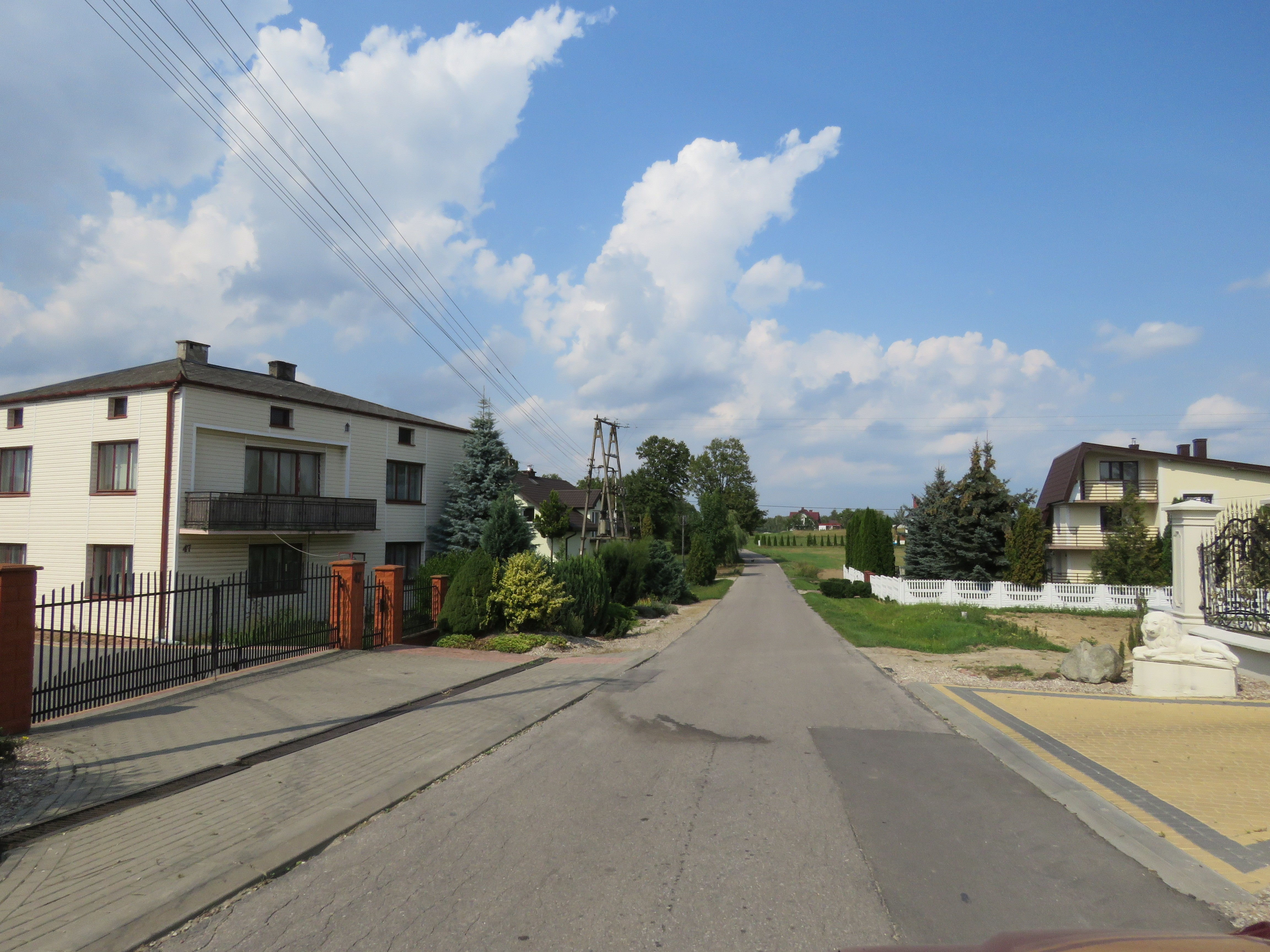 PIOTRAWIN